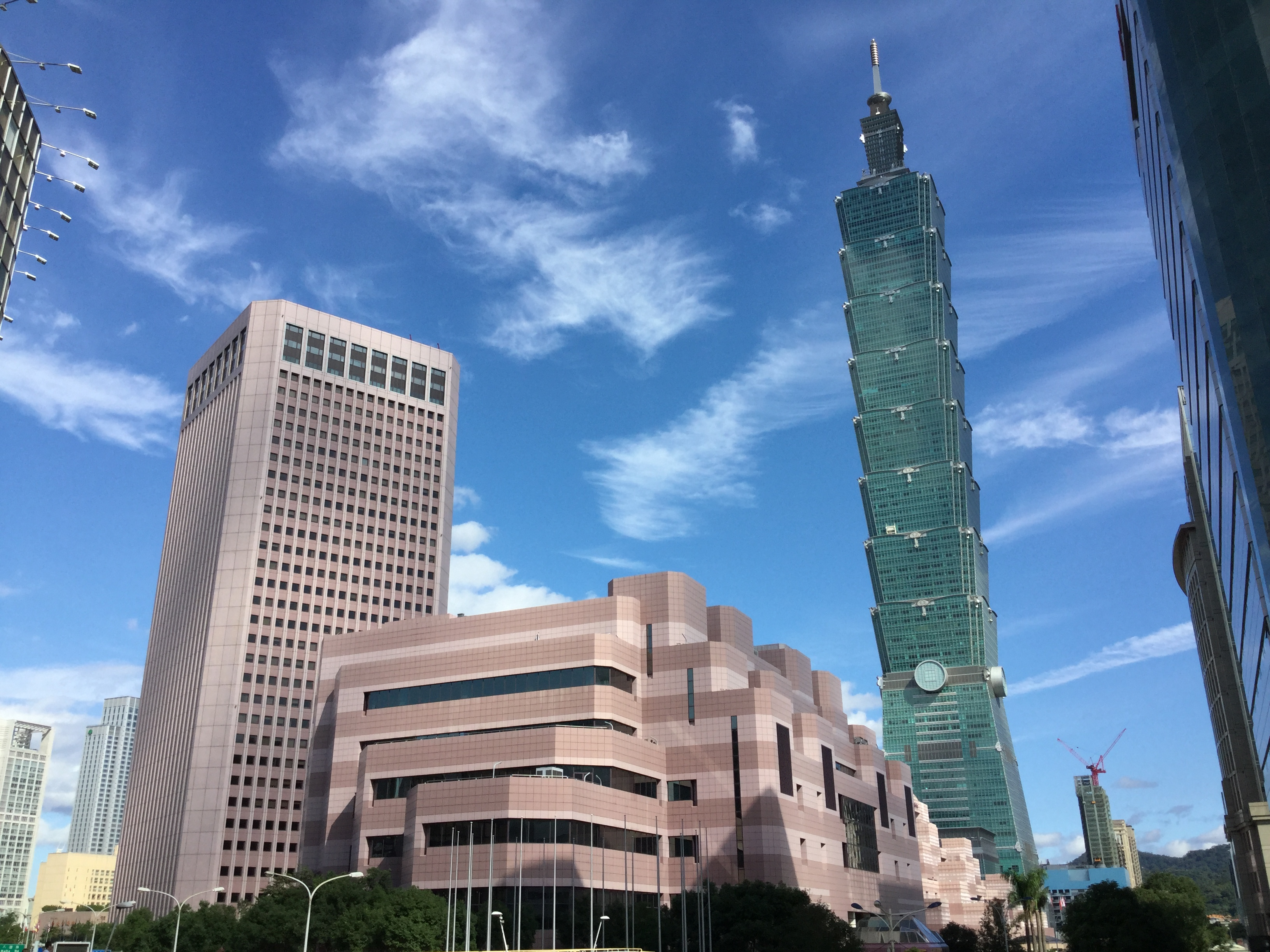 中文（台灣）: 左起：台北世界貿易中心國際貿易大樓、台北國際會議中心、台北101大樓。